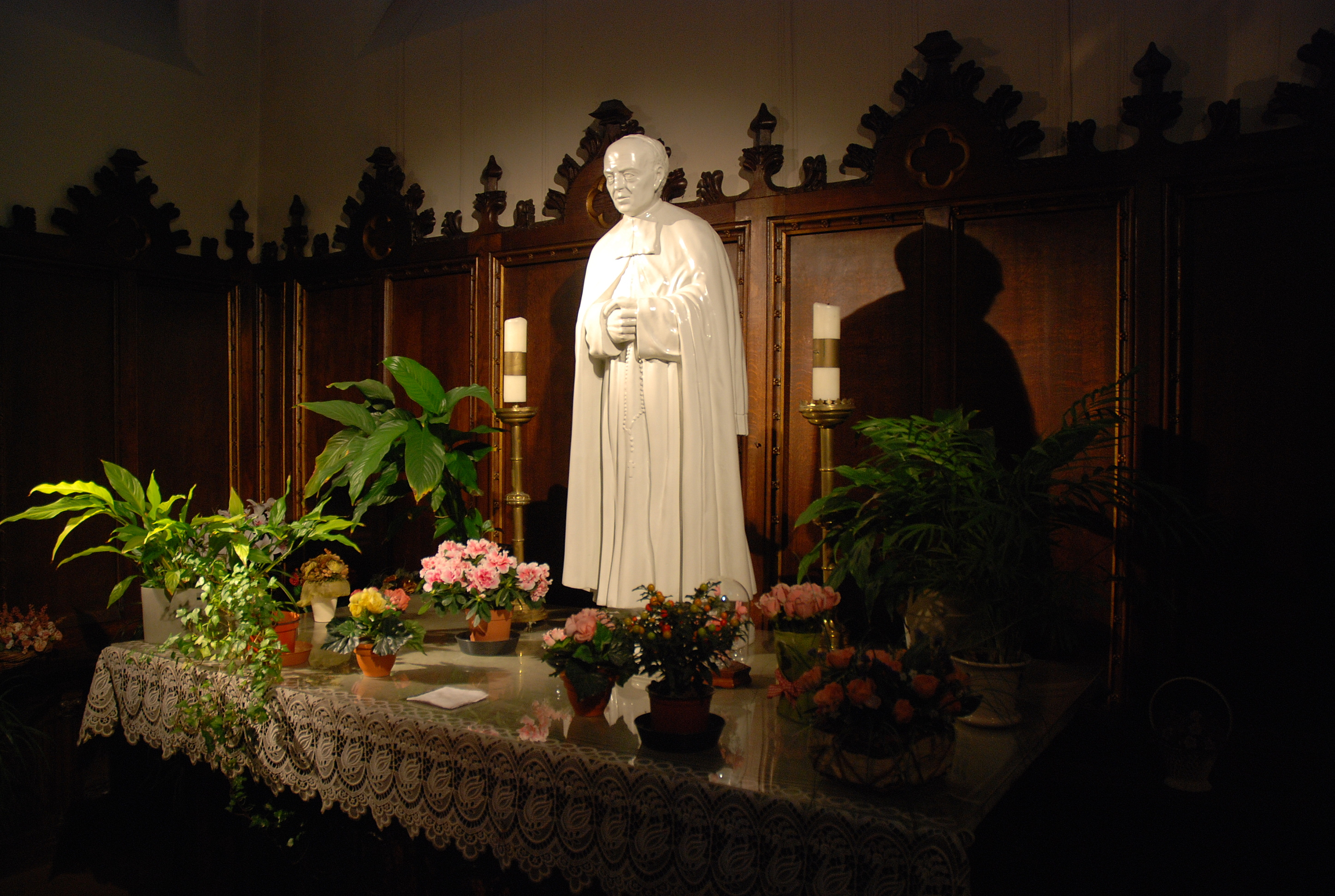 Mutien Marie à l'église de Aarsele, Belgique